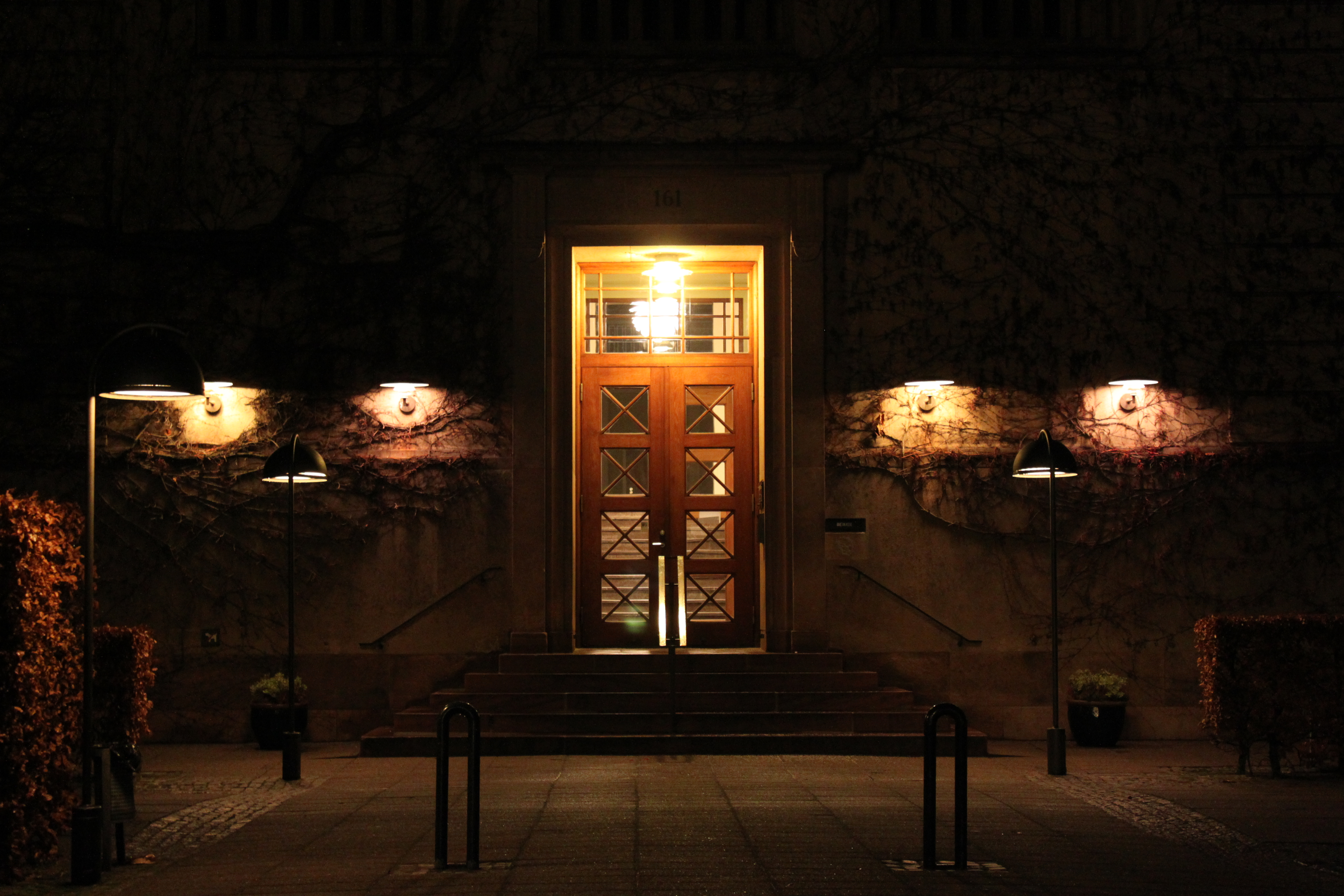 Aftenbillede af indgangspartiet på Gentofte Rådhus, Danmark - Detalje med husnummer på Bernstorffsvej.